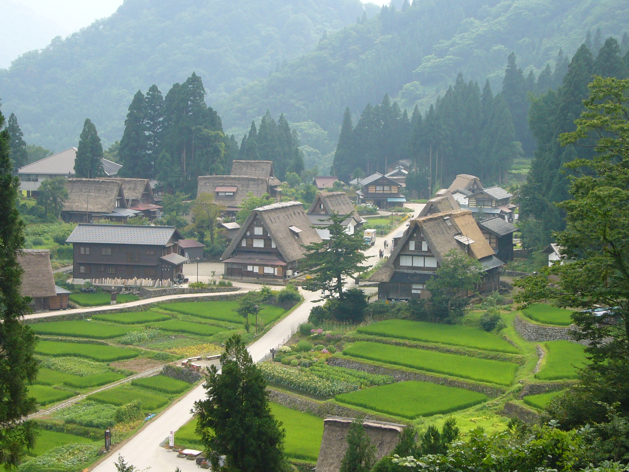 富山県南砺市（旧平村） 越中五箇山 相倉合掌集落